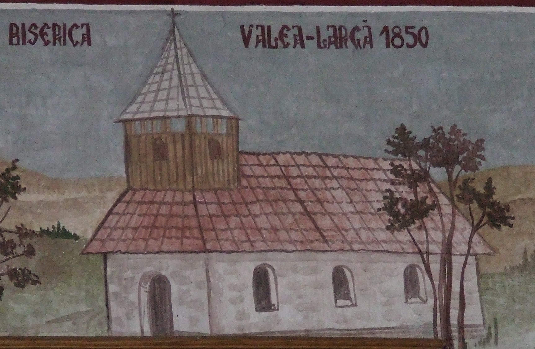 Reprezentarea bisericii de lemn cu hramul Cuvioasa Paraschiva în biserica nouă de zid din Valea Largă, judeţul Mureş.